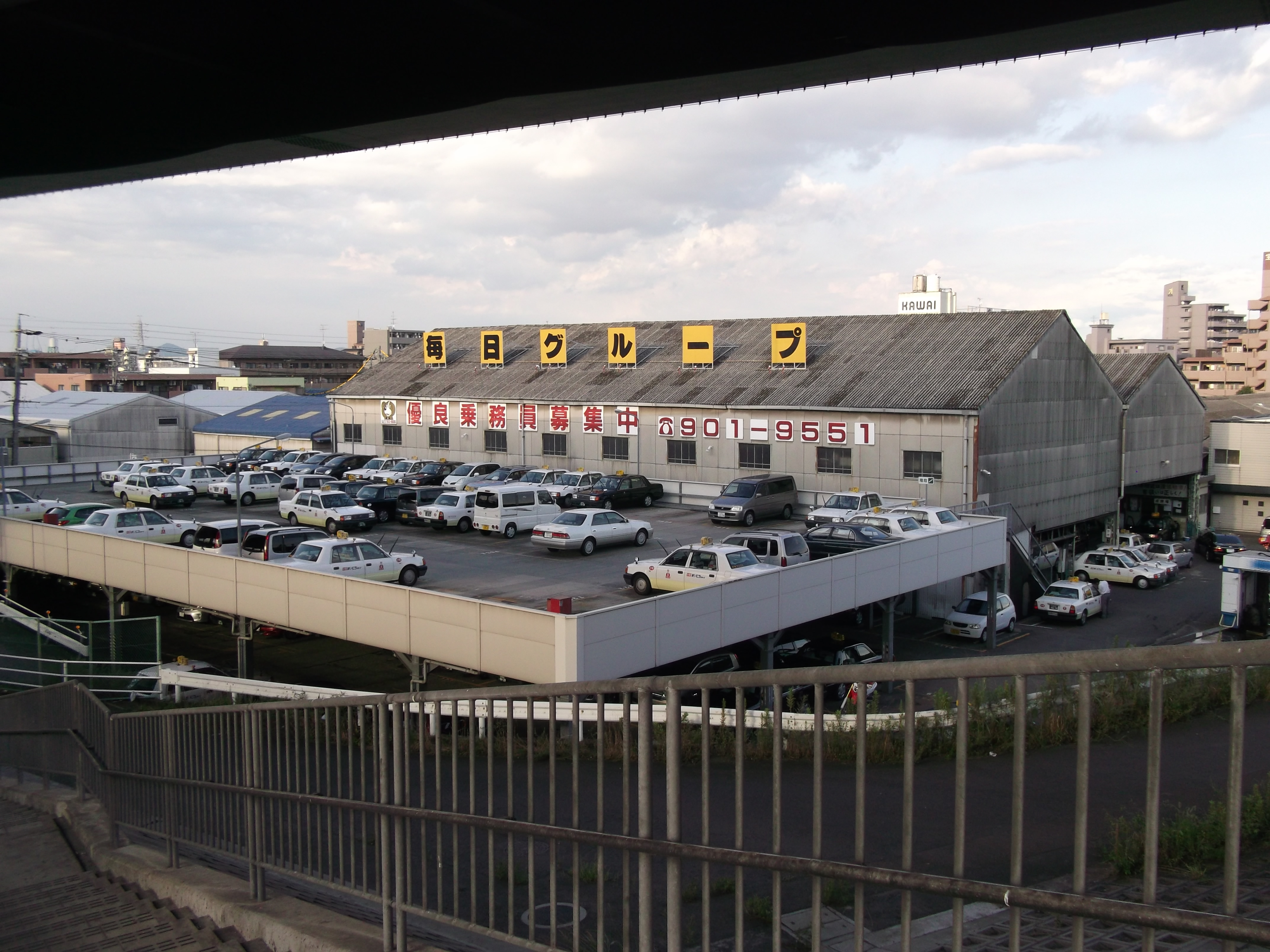 名古屋市北区のまいにちタクシー協同組合本部を西側公道南側より撮影。画面上の陰は名古屋高速1号楠線高架。